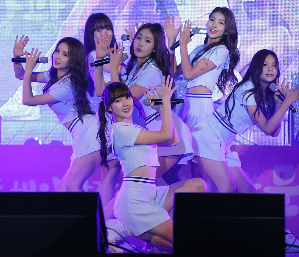 여자친구(GFRIEND) 러시아 문화 페스티벌 인천 연안부두 해양광장